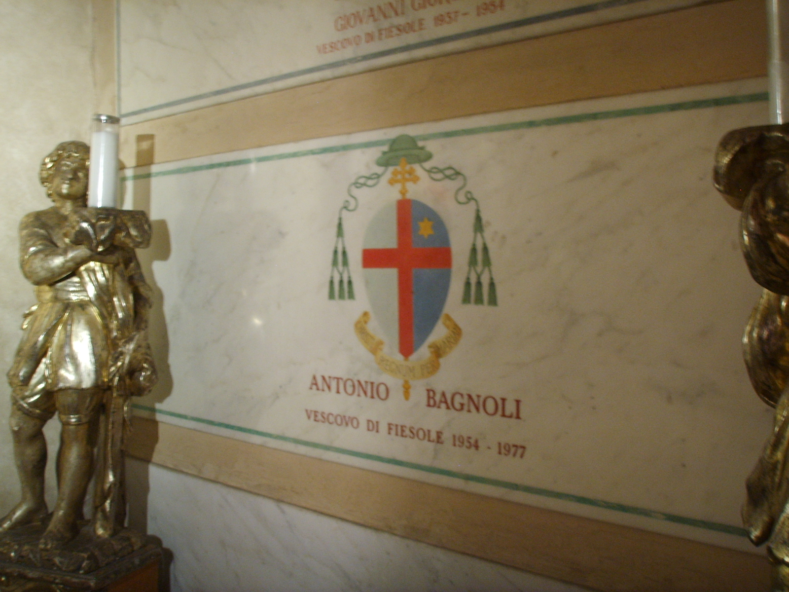 Duomo di fiesole, cripta, tomba antonio bagnoli